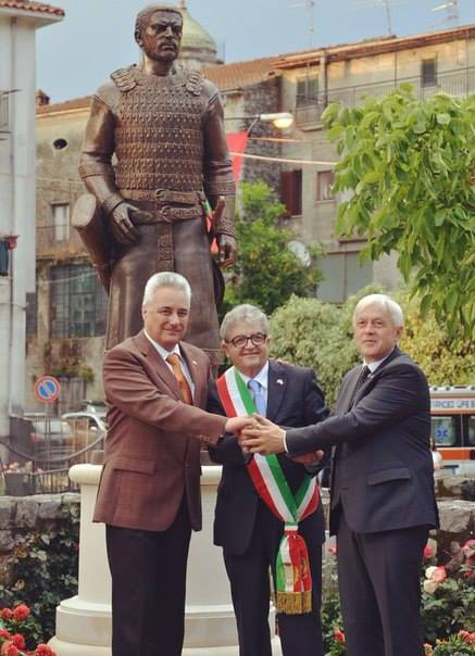 Альцек